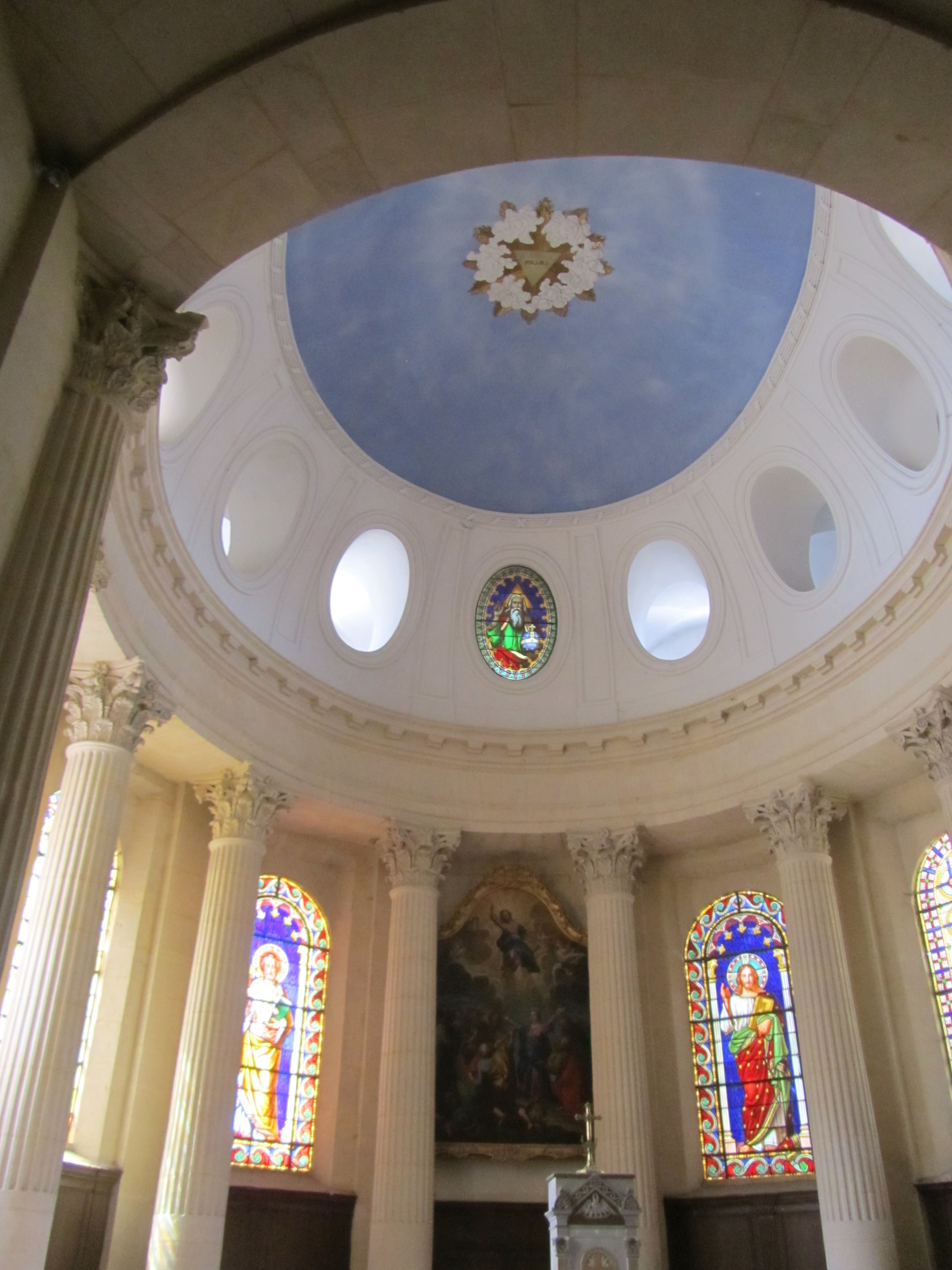 Coupole du choeur de l'église de Givry